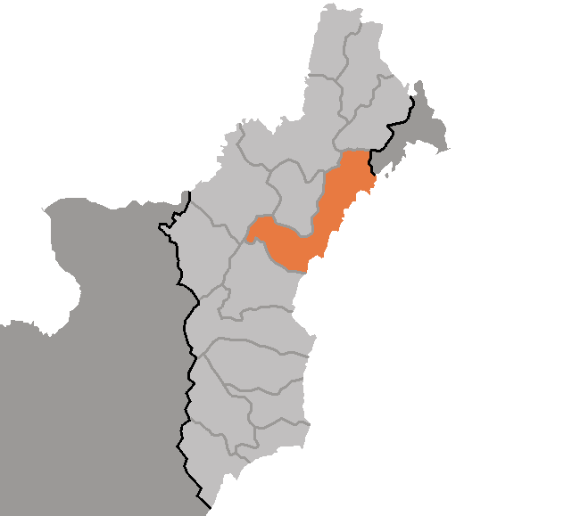 Map of Chongjin, Hamgyong-pukto, DPRK, 2006